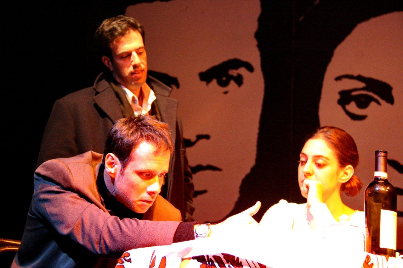 מיכאל גמליאל, אירית דקל ואלי נעים ב""מראט המסכן שלי" בבימויו של סלבה מלצב, תמונה נוספת